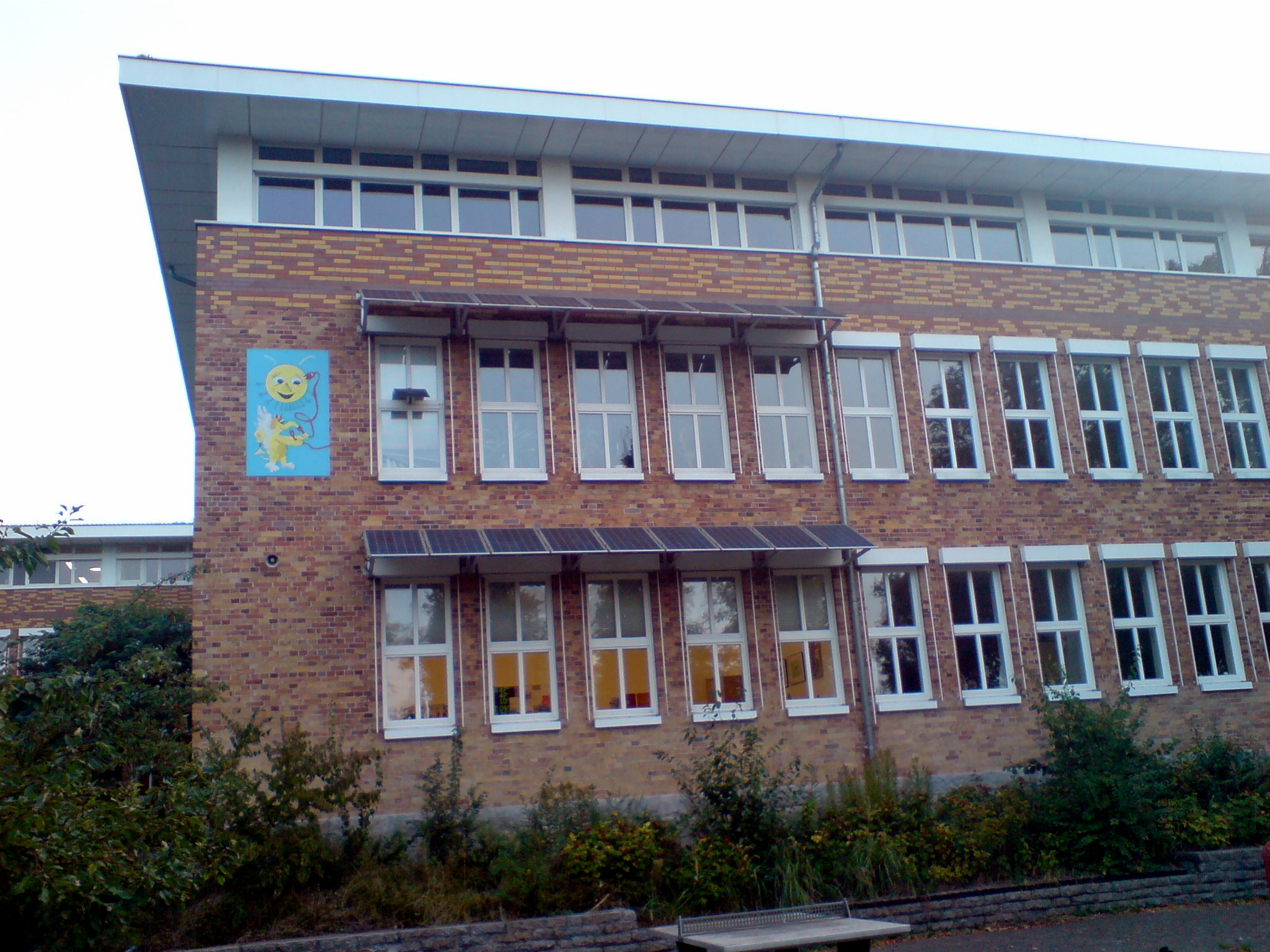 Die Photovoltaikanlage des Musikgymnasiums Käthe Kollwitz Rostock am süd-westlichem Teil des Schulhauses